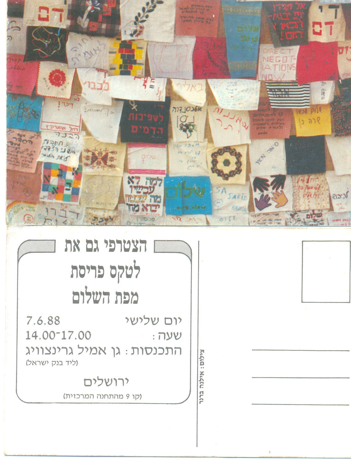 גלויה, מפת השלום 1988